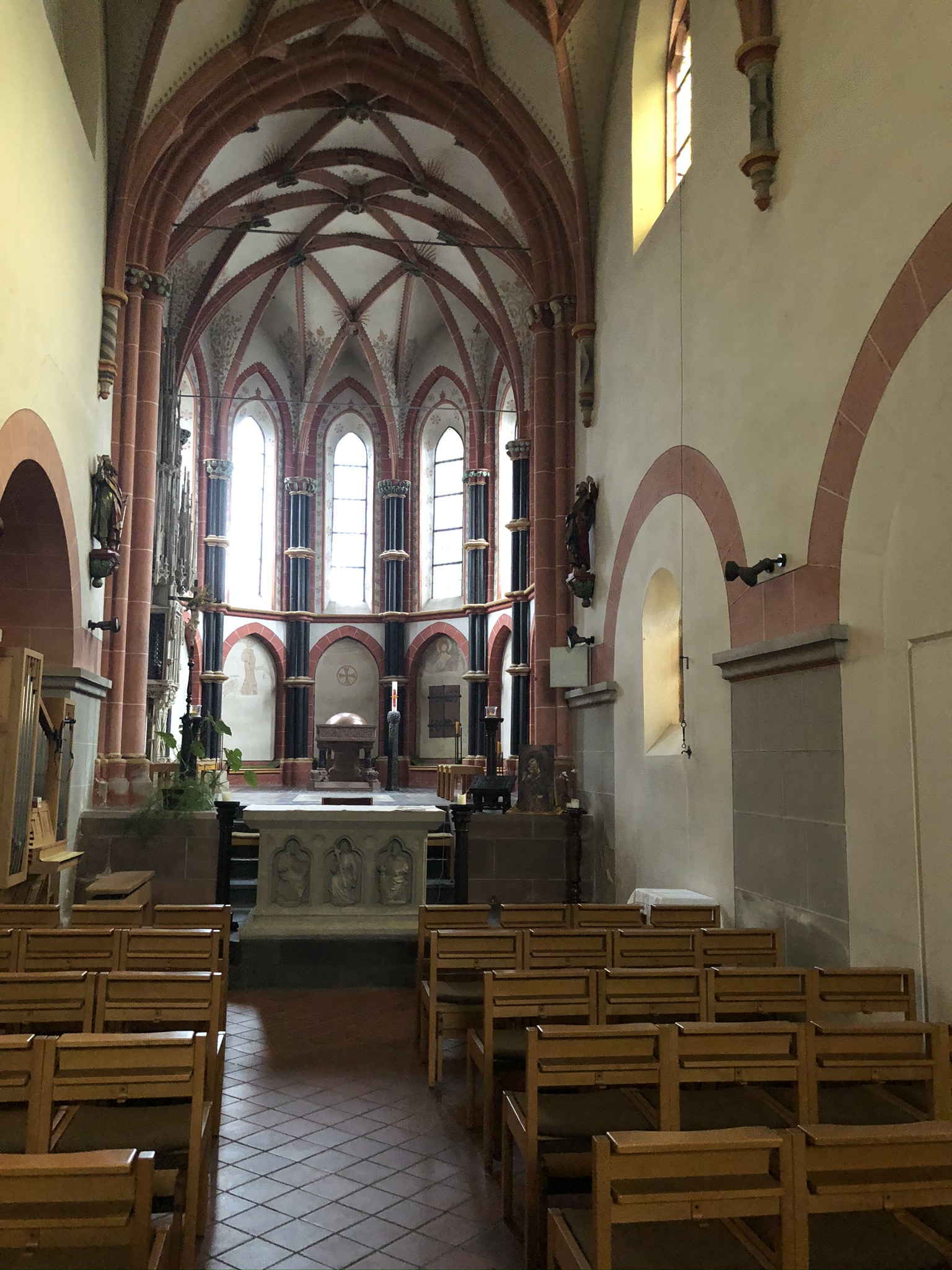 St. Peter und Paul Kirche in Remagen, Chor des älteren Teils